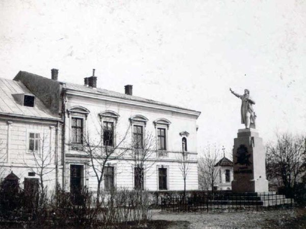 Świętego Jana Square in Sanok